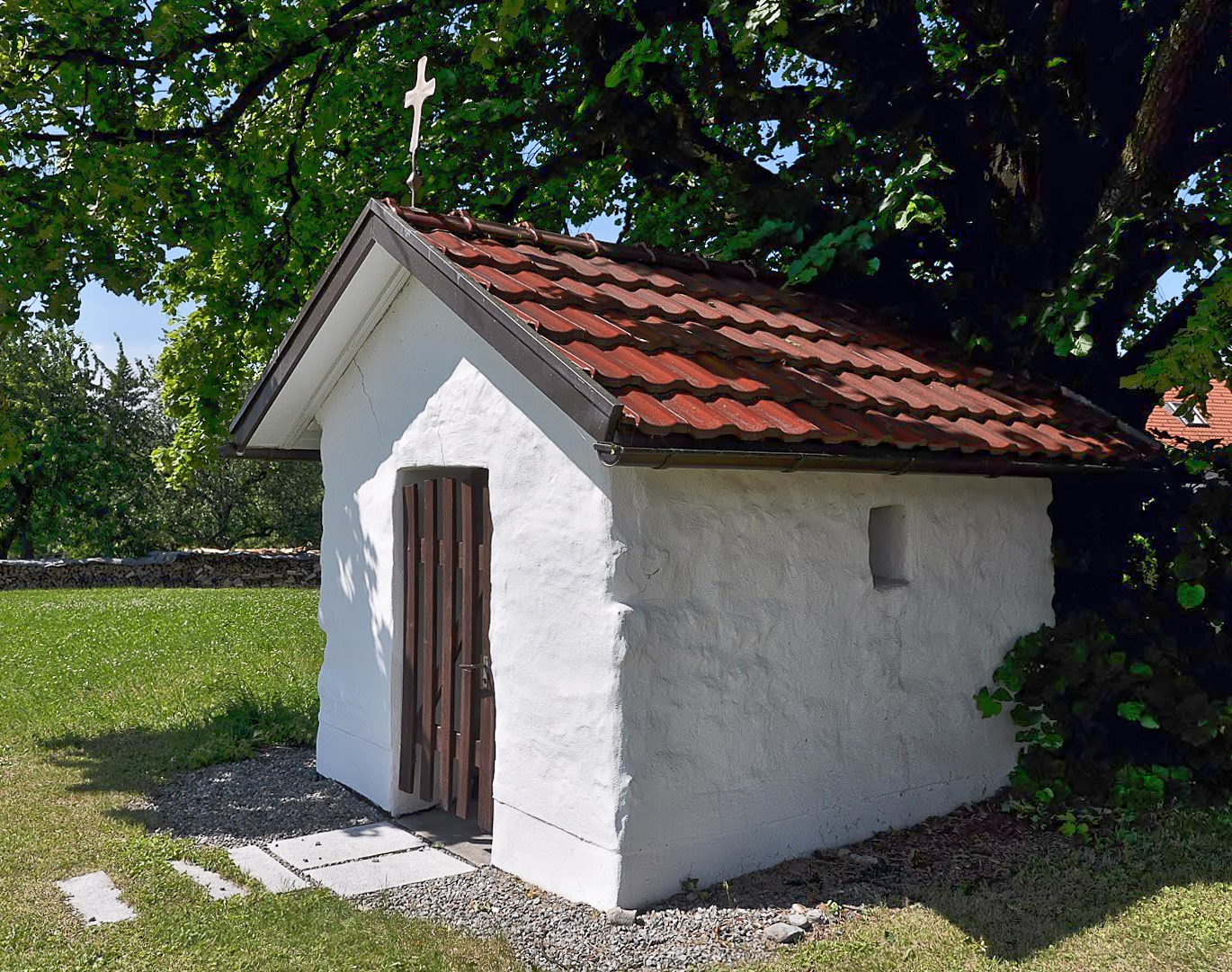 Kapelle in Weißensberg, Allgäu